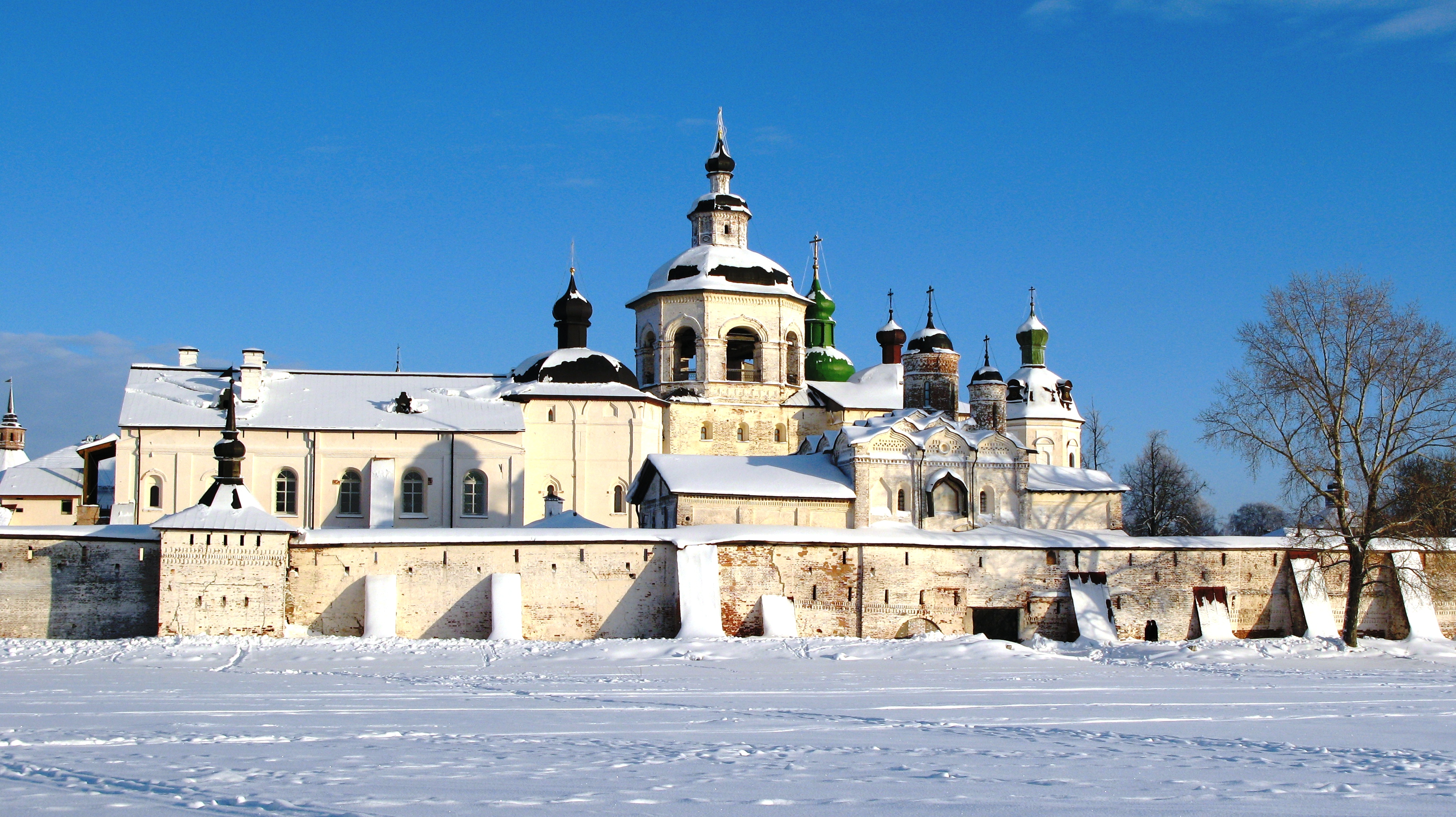 Ансамбль Кирилло-Белозерского монастыря (историко-архитектурный и художественный музей-заповедник) (Вологодская область, Кириллов, город Кириллов)